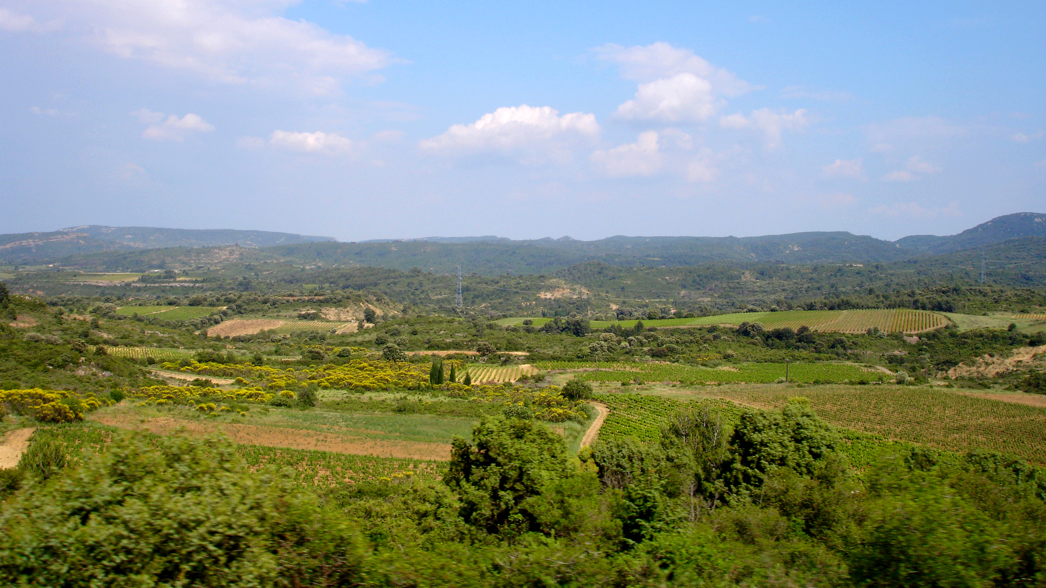 France, Aude (11), région des Corbières près de Villerouge-Termenès